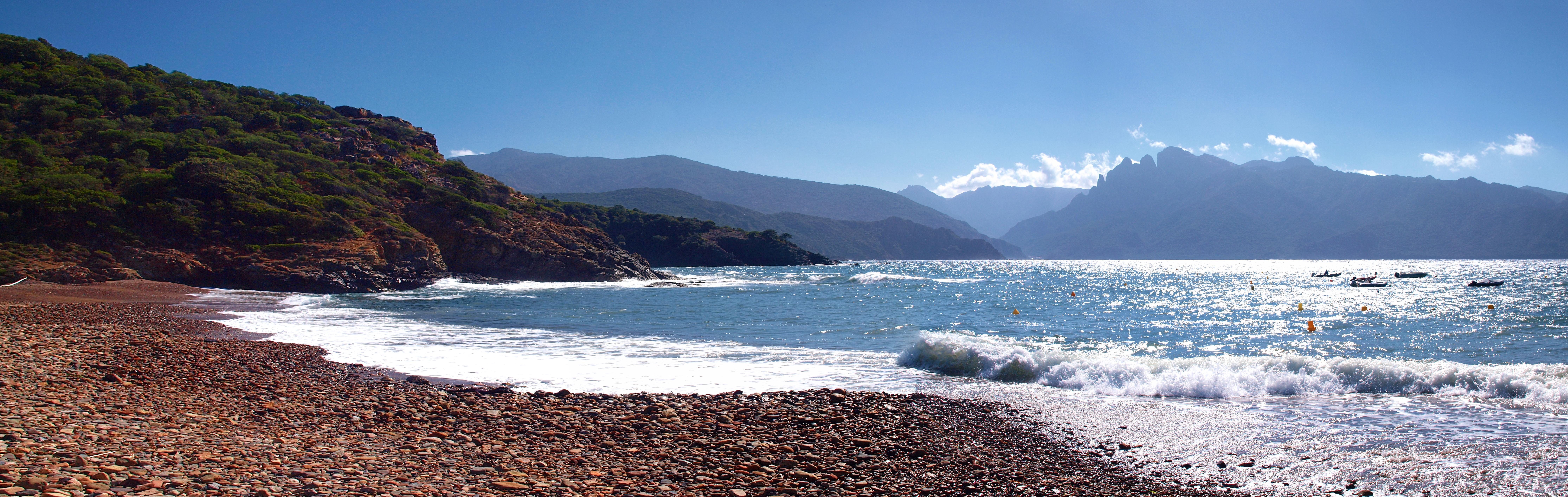 Osani (Corsica) - Vue du golfe de Porto depuis la plage de E Gratelle